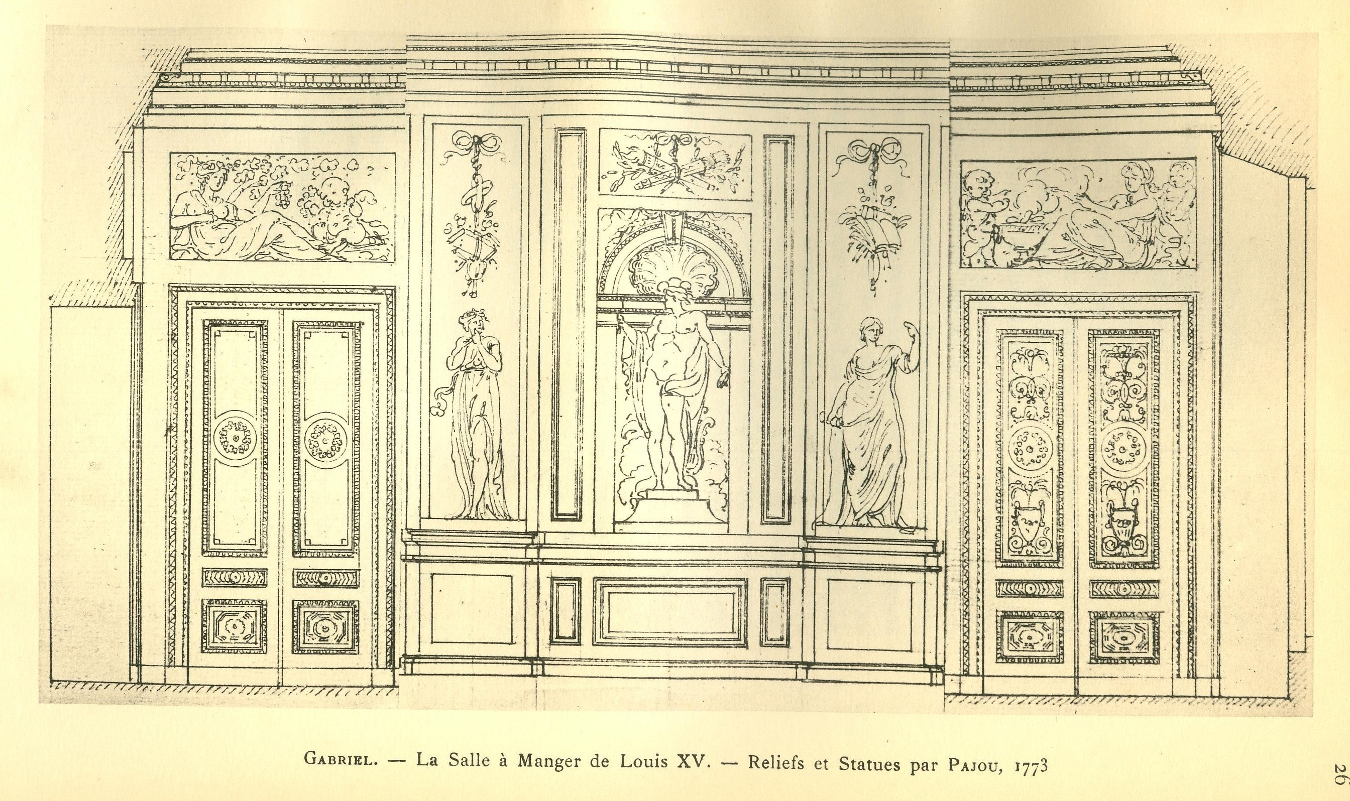 Paroi du côté de Sèvres du grand salon de Bellevue, 1773. Non achevé à la mort de Louis XV en 1774. Archives nationales.